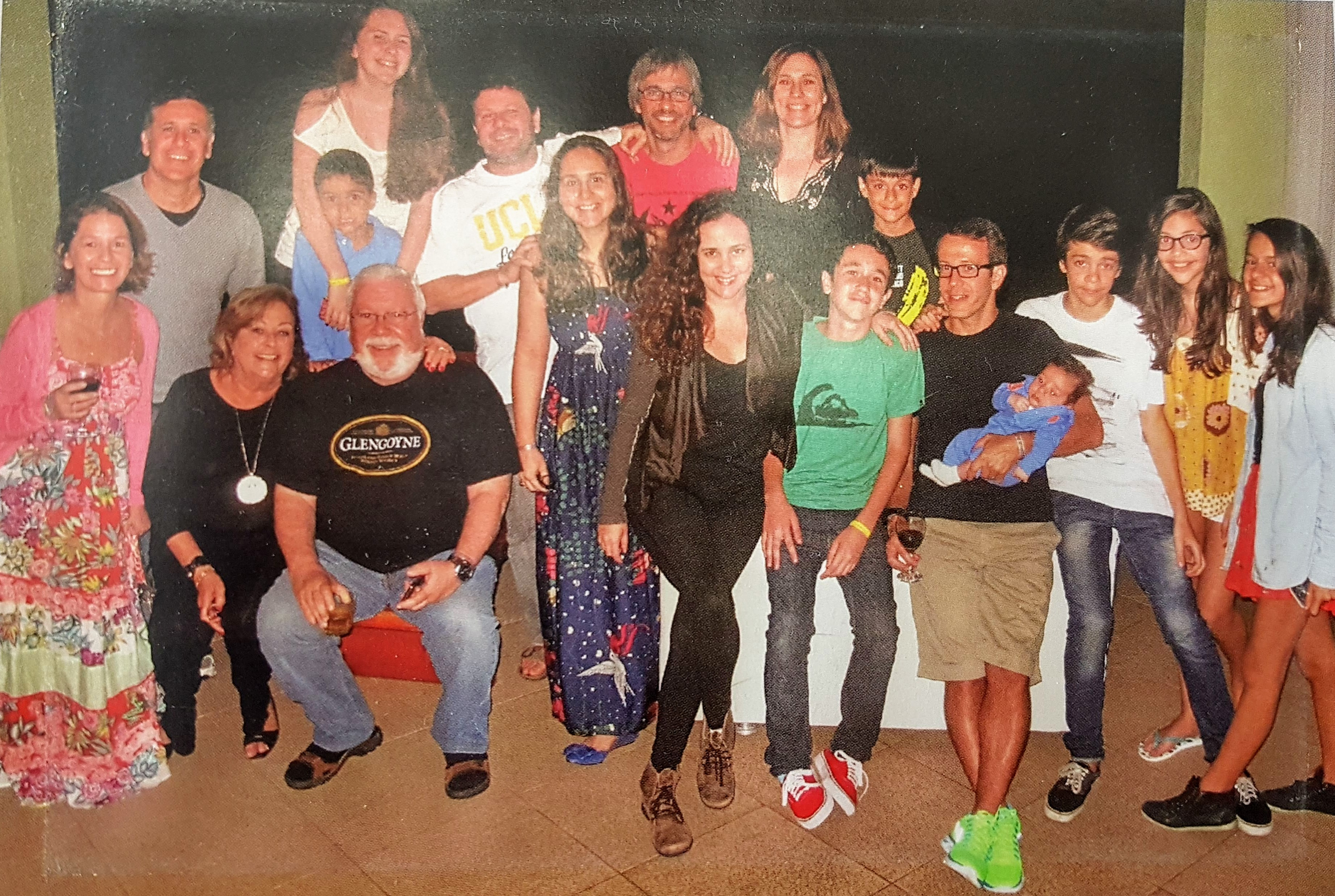 Em família